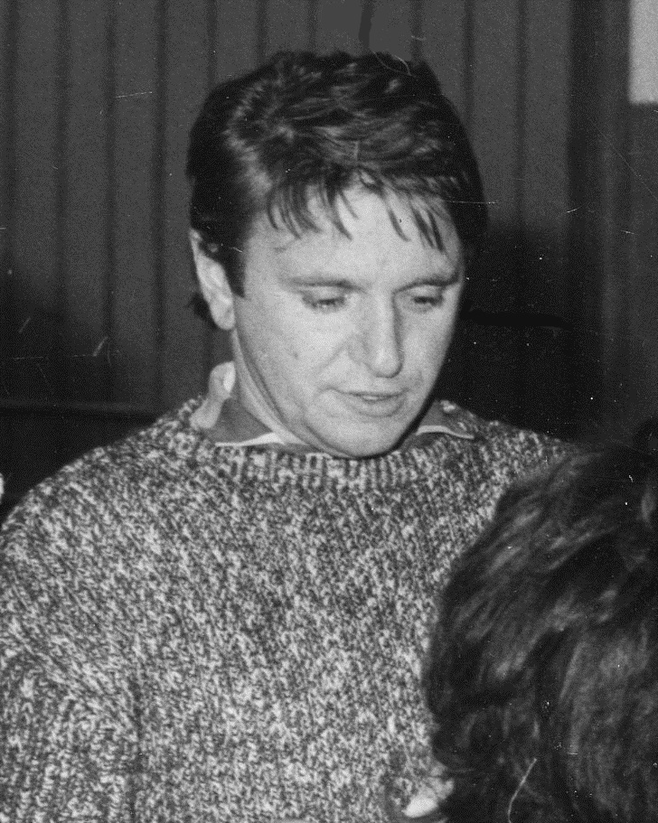 Komár László 1986-ban